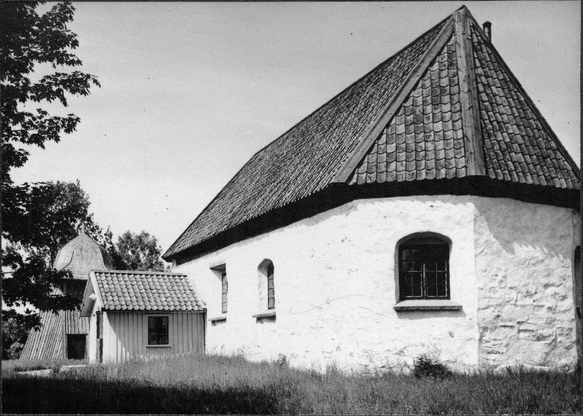 Kyrkan från sydöst.